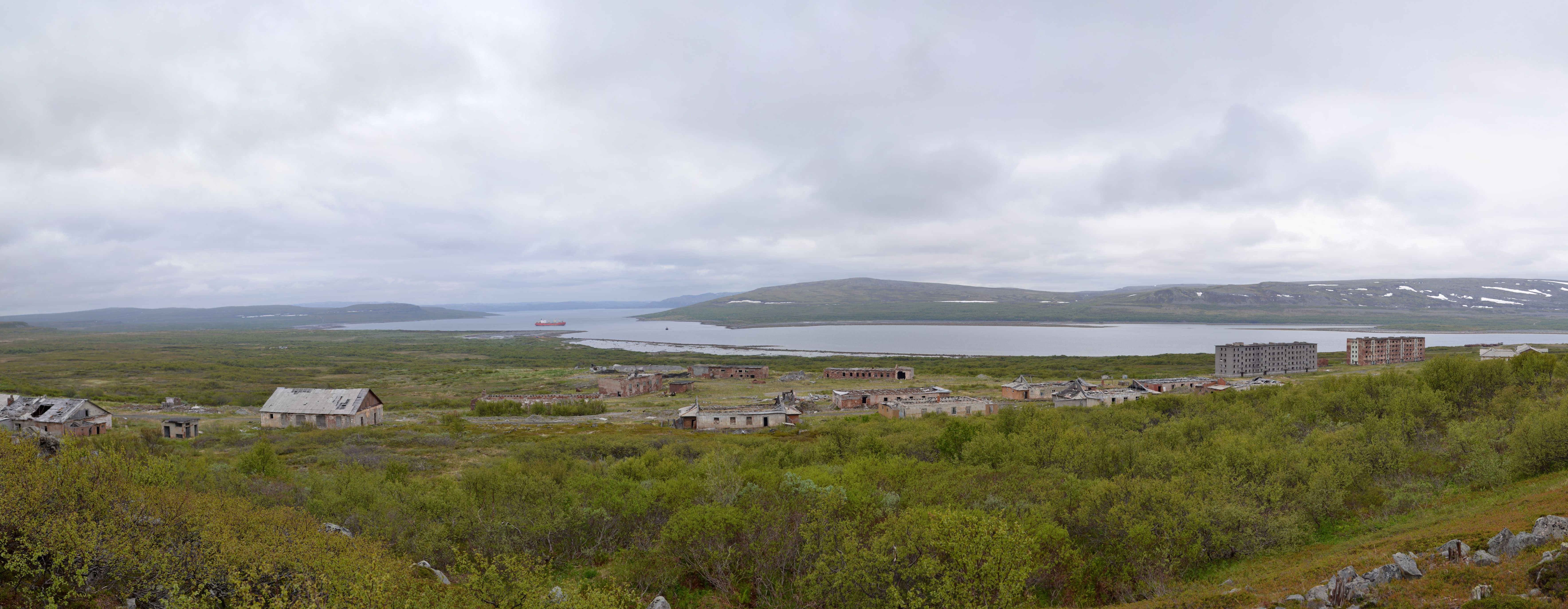 Большое Озерко. Июнь 2012 г.